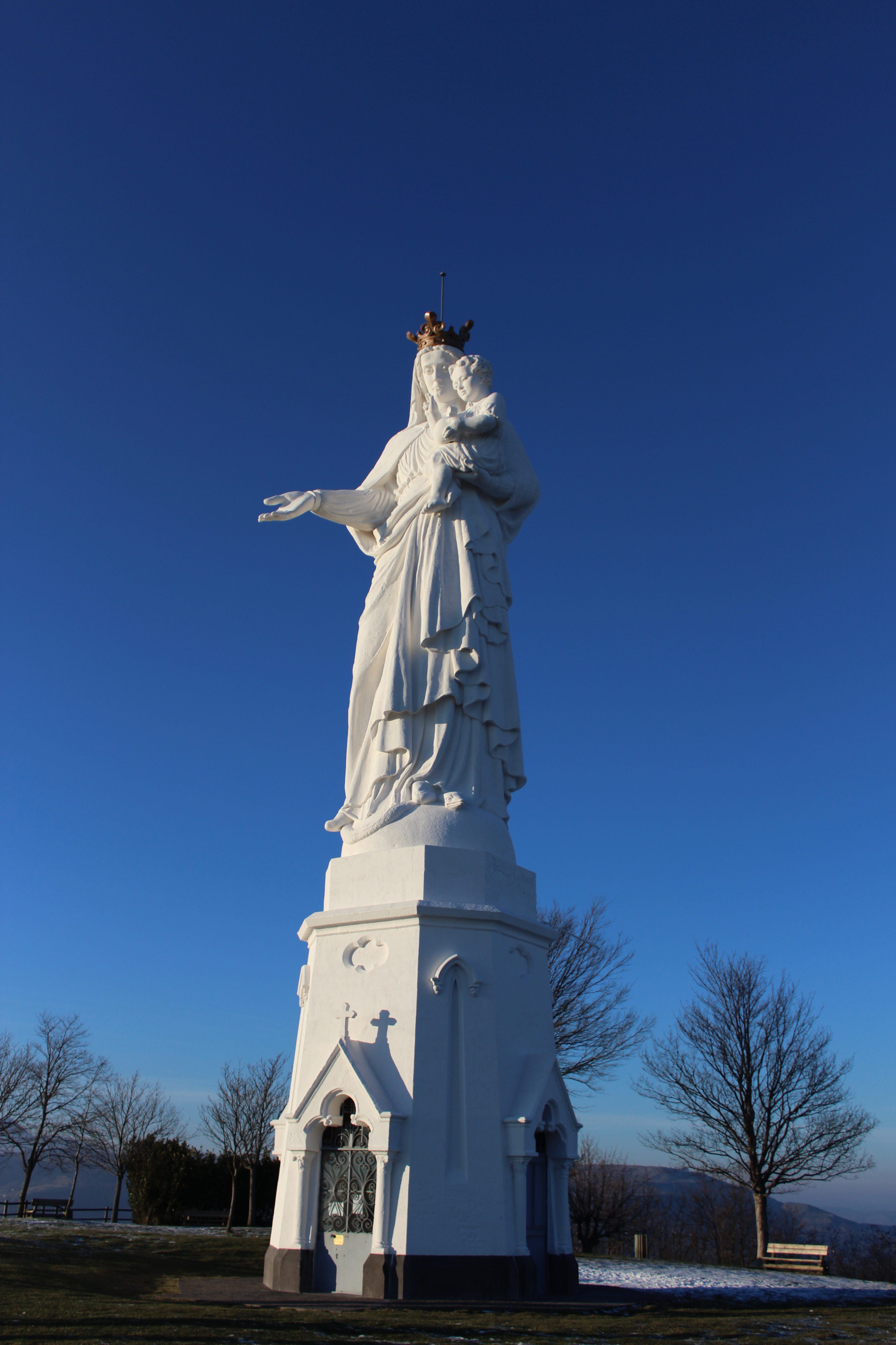 Notre-Dame de Monton (Puy-de-Dôme, Auvergne, France)